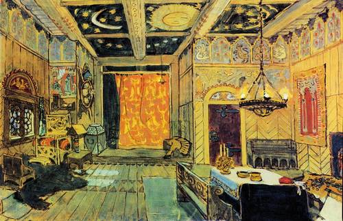 Хоромы княгини. 1900 Эскиз декорации к опере А.С. Даргомыжского "Русалка" Музей Государственного академического Большого драматического театра